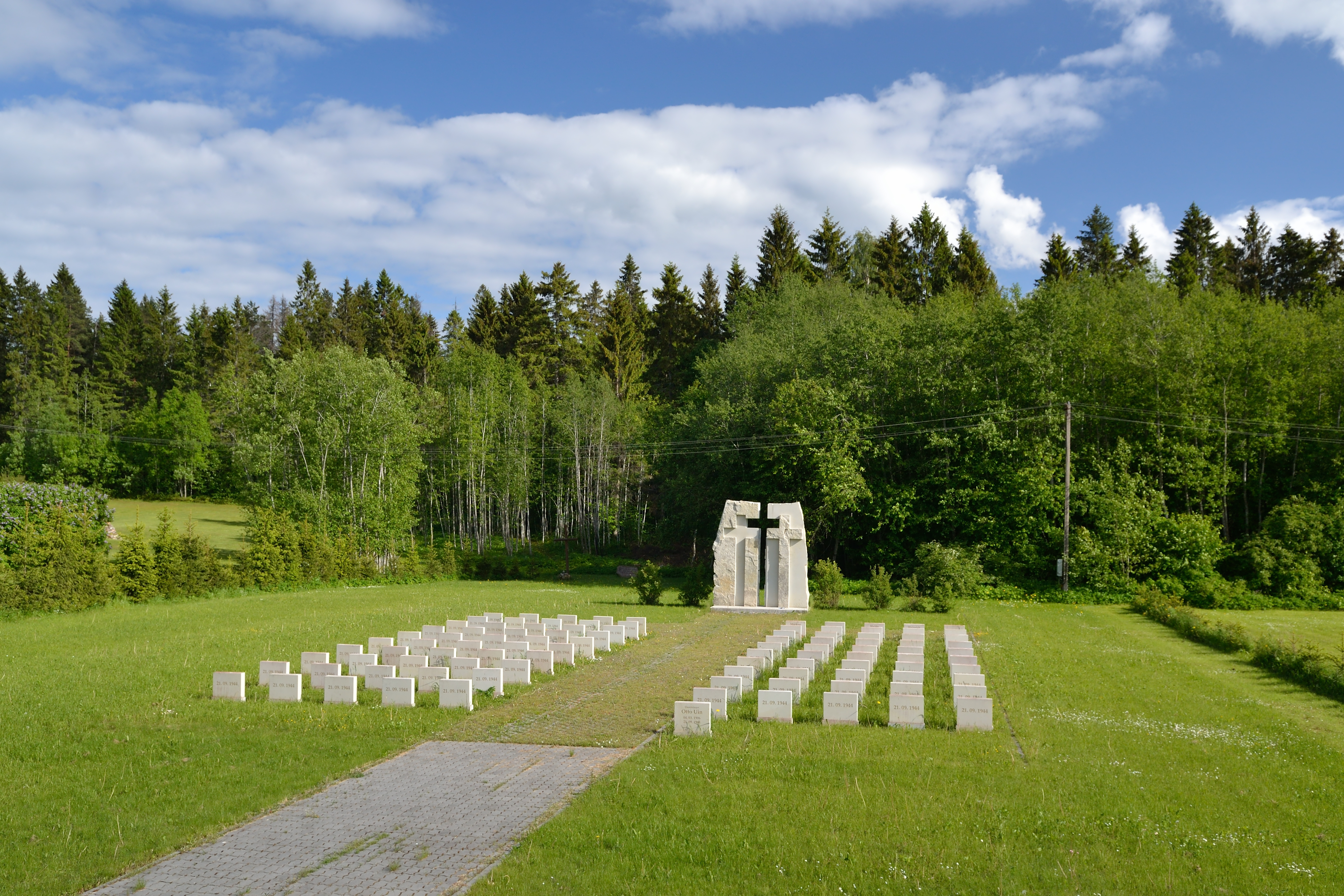 II maailmasõjas hukkunute matmispaik (Porkuni lahing)